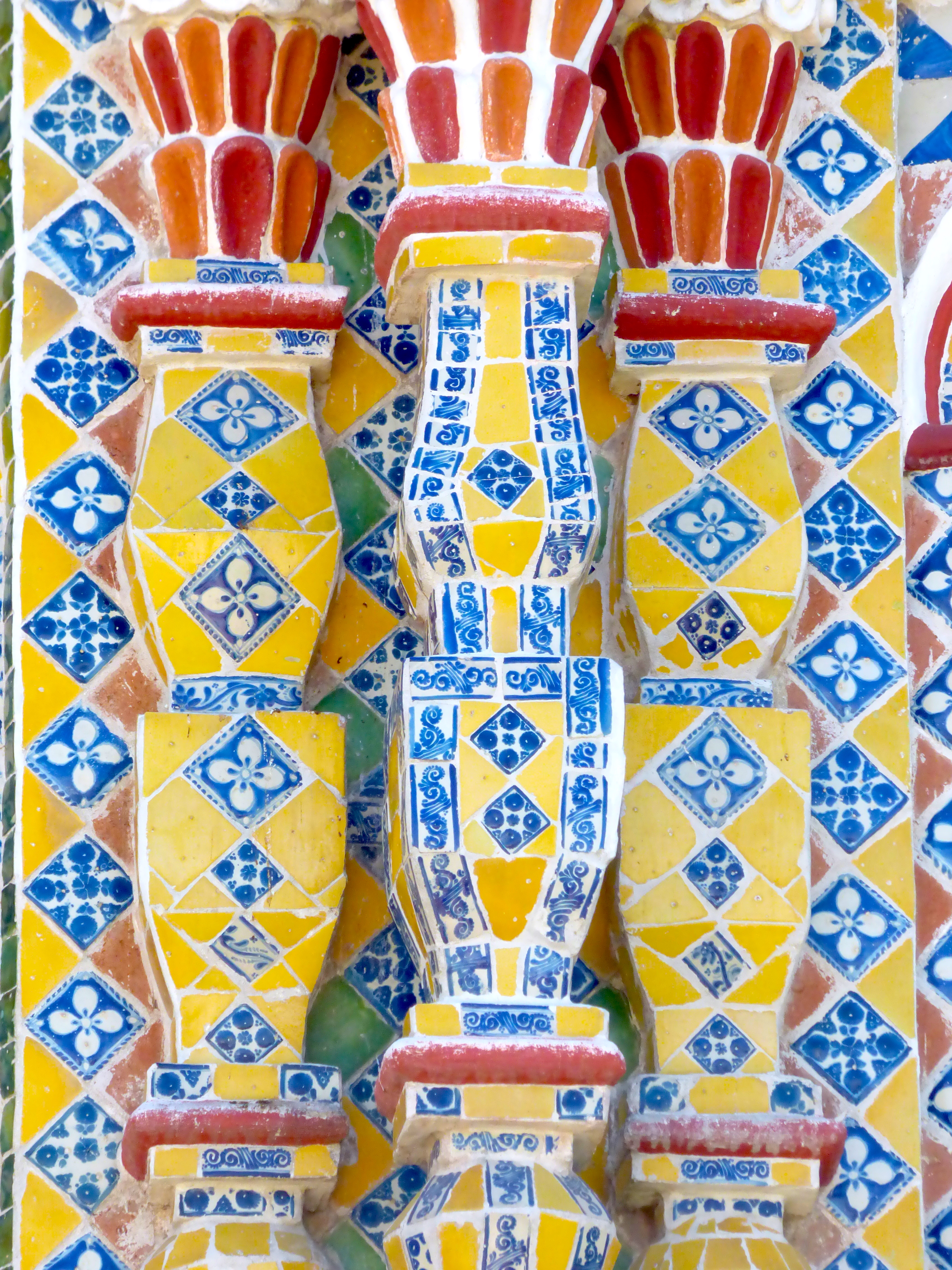 Estípites del Templo de San Francisco Acatepec